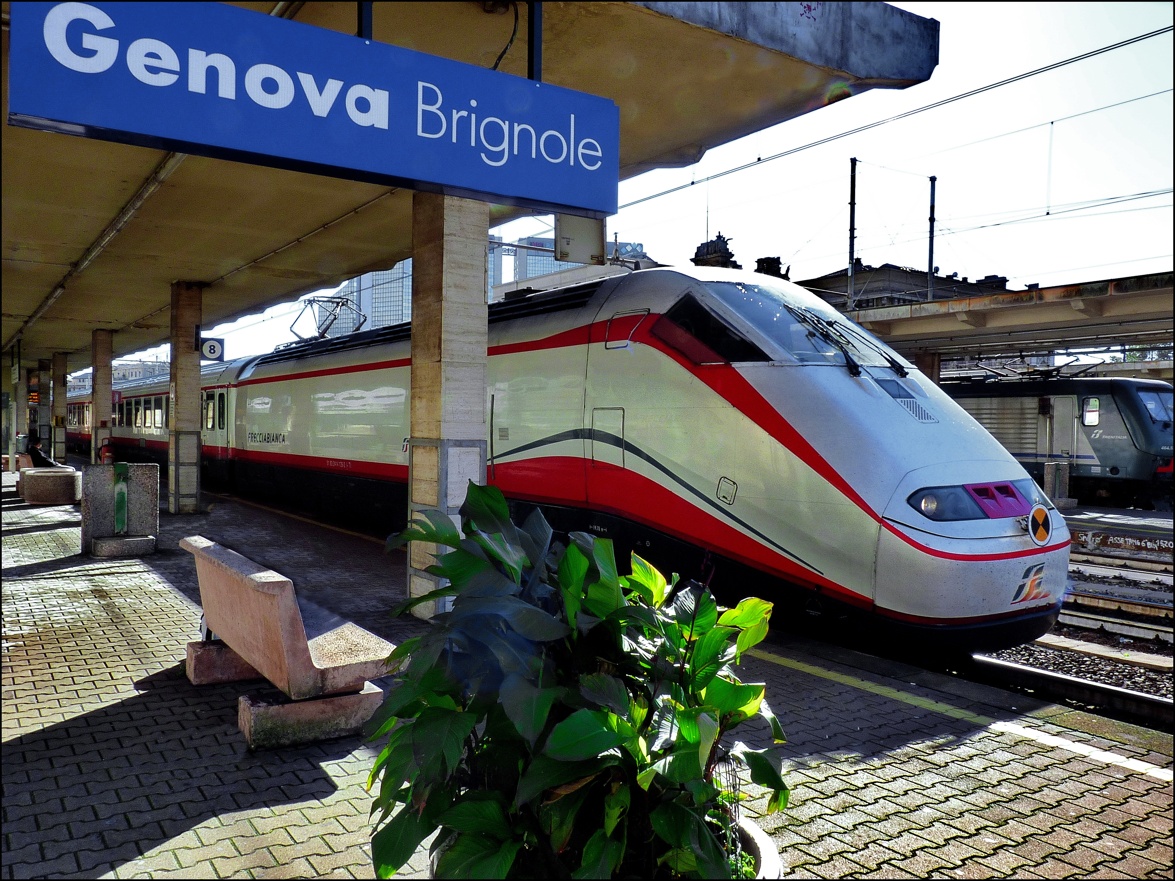 la stazione Brignole - freccia bianca